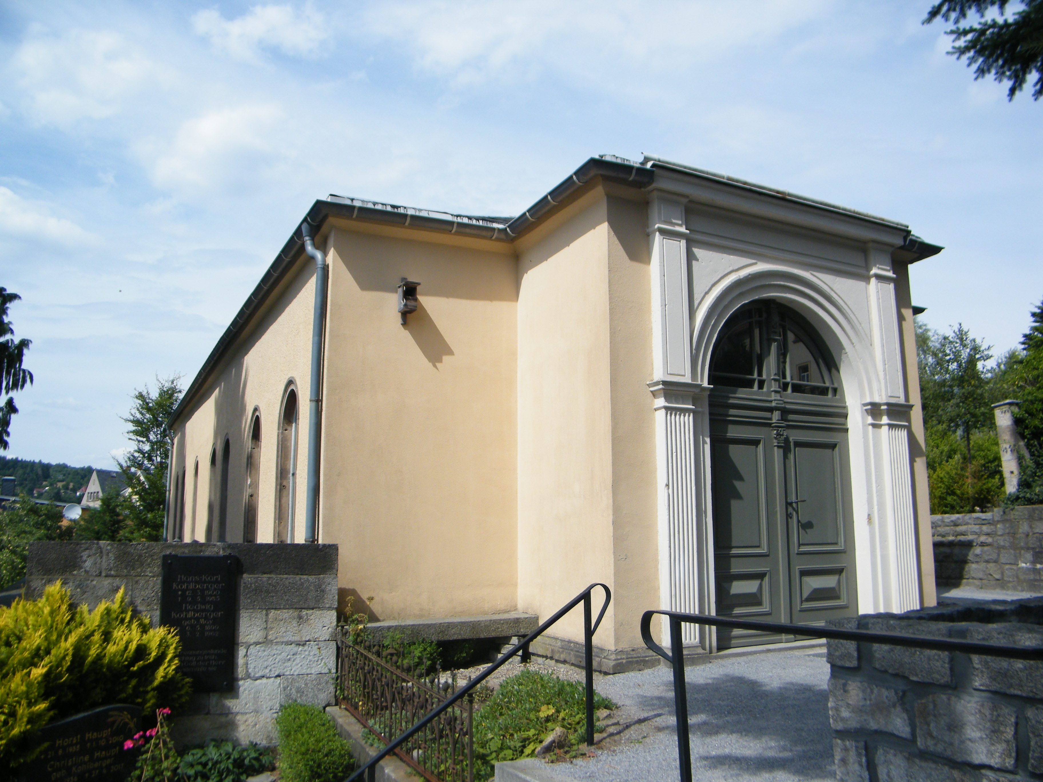 Friedhofskapelle in Sebnitz